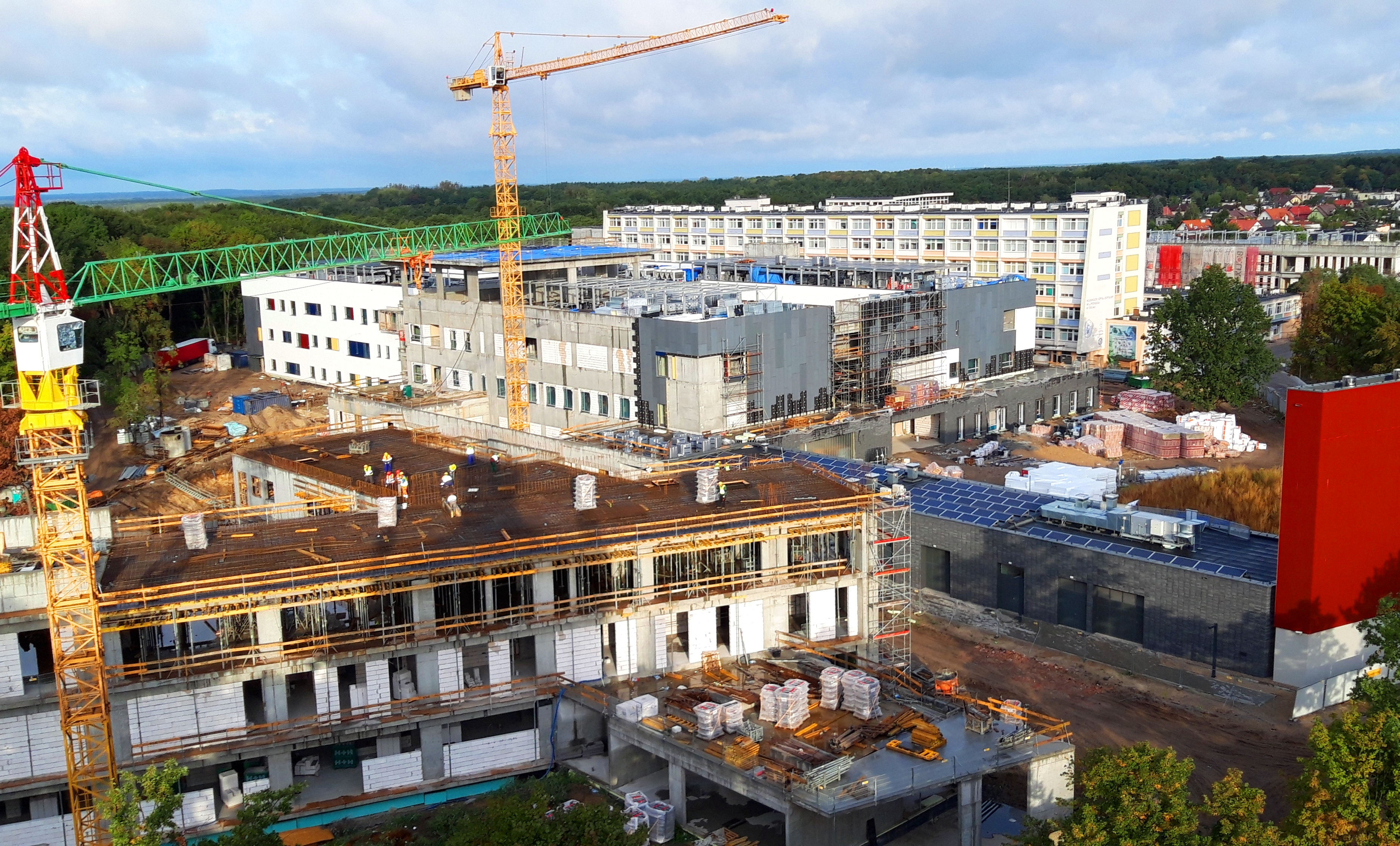 Budowa WSZ w Toruniu2